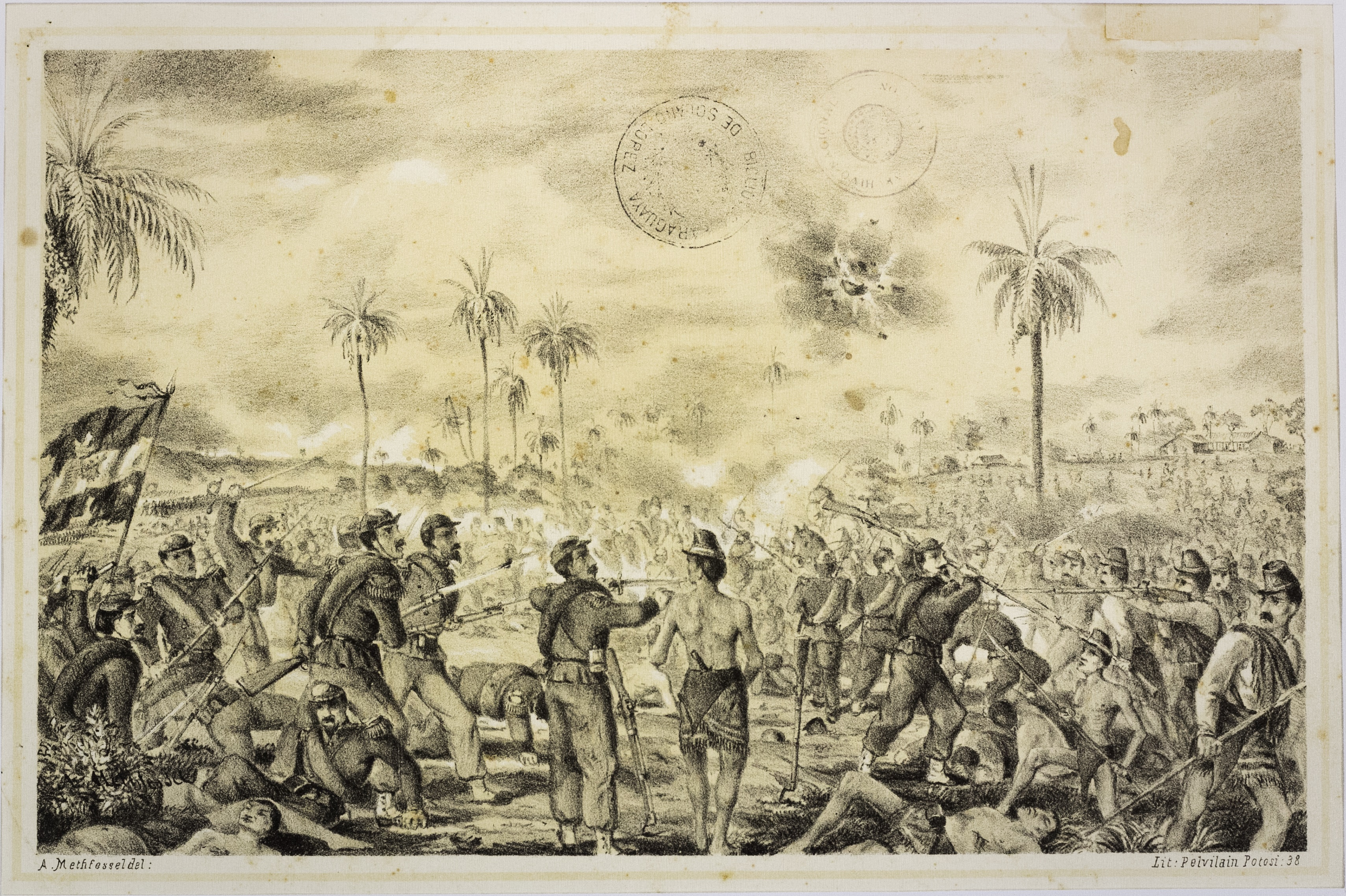 ¡Viva la Legión Militar! Toma de Loma Valentina por los Aliados. El 27 de Diciembre de 1868. Dibujo de A. Methfessel, Lit. Pelvilain.